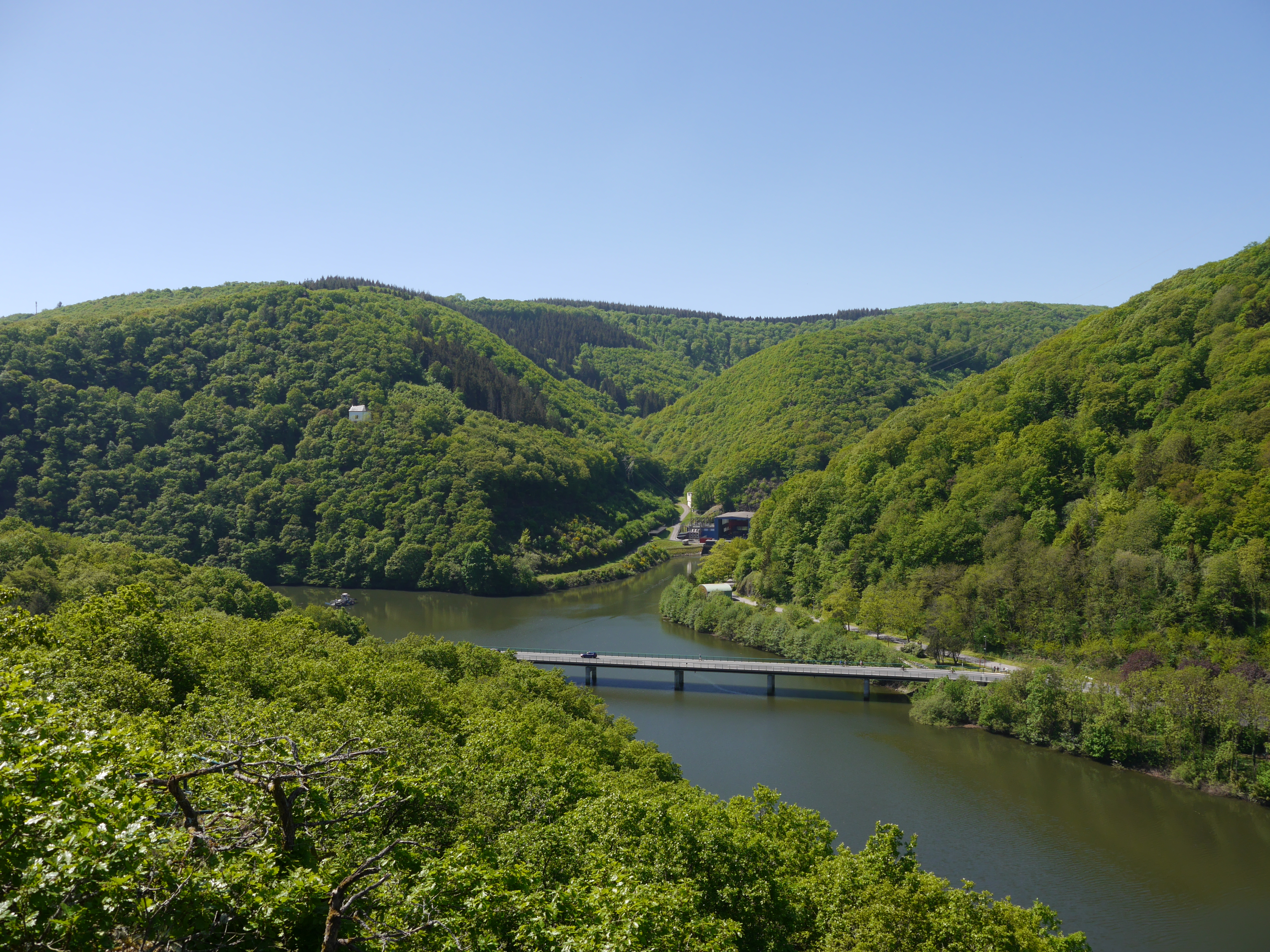 Tal der Our zwischen Deutschland (vorne) und Luxemburg (hinten): N10-Straßenbrücke über die Our in der Nähe vom Maschinenhaus 10 des PSW Vianden (etwa Bildmitte), Kapelle Notre-Dame in Vianden (links am Hang)